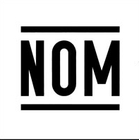 Logo for Norma Oficial Mexicana.